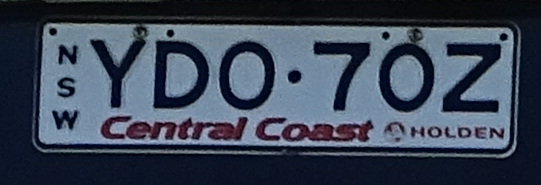 Holden Commodore SSV